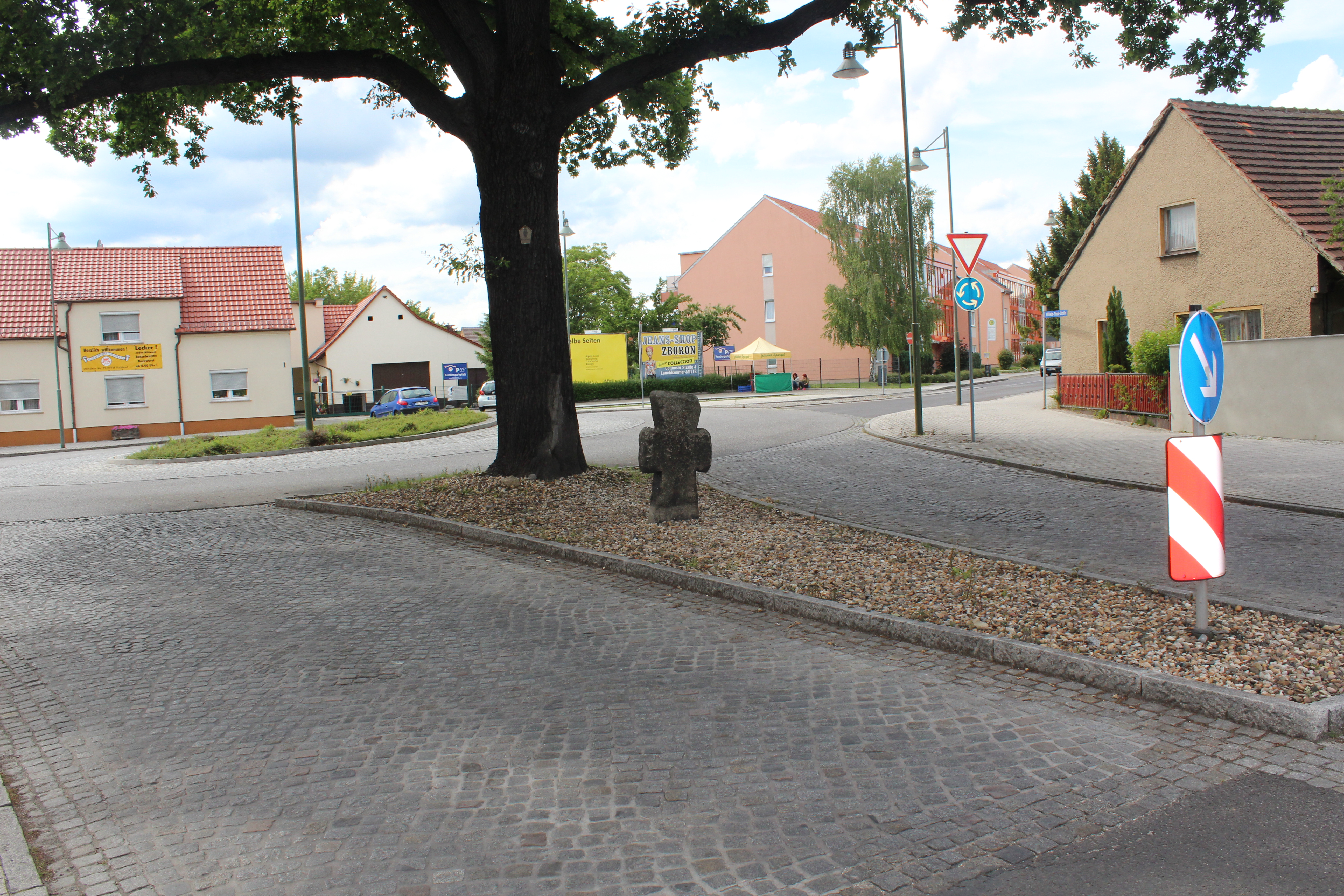 Steinkreuz in Lauchhammer-Mitte.